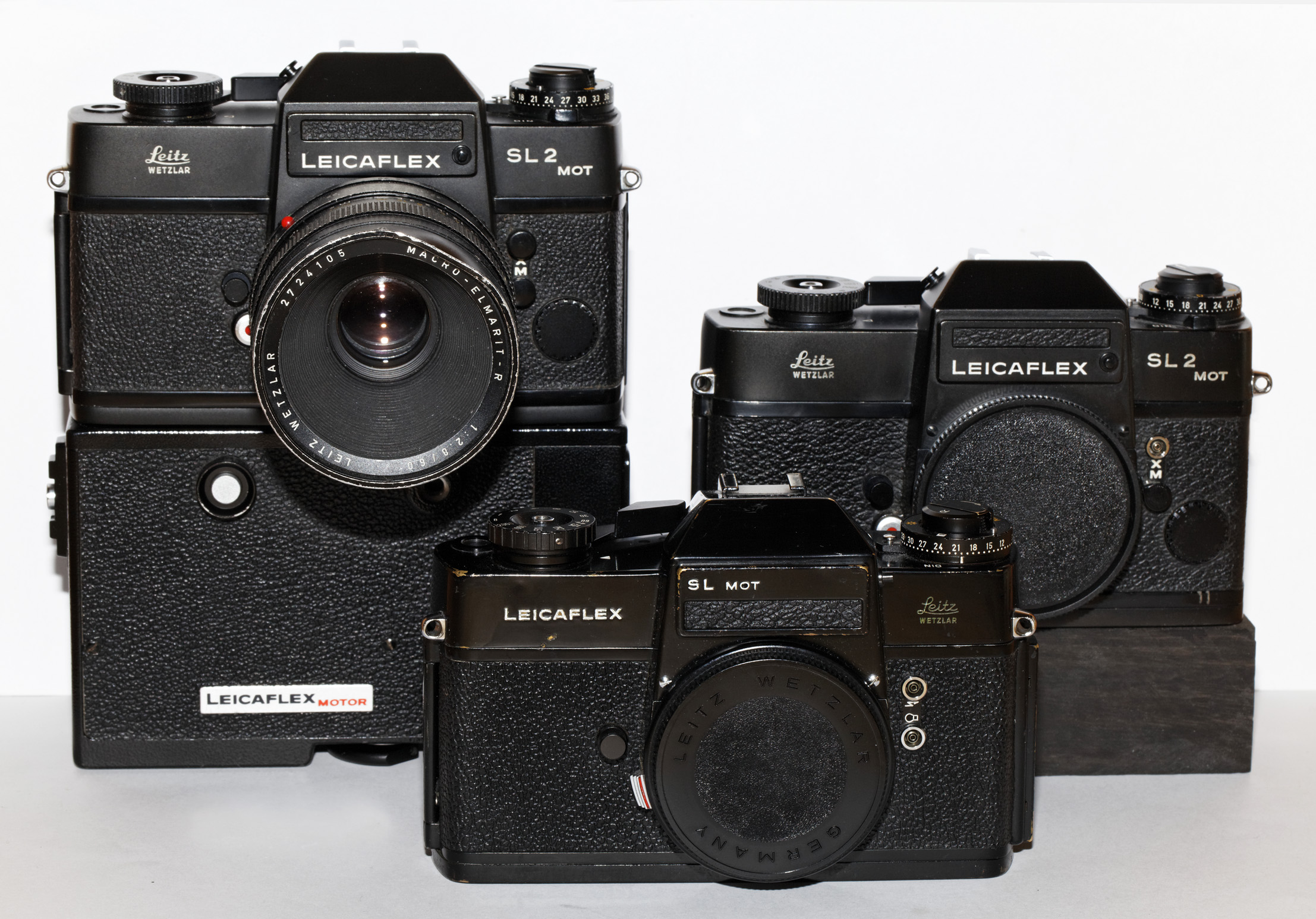 Leicaflex SL und SL2 MOT "Familienportrait"